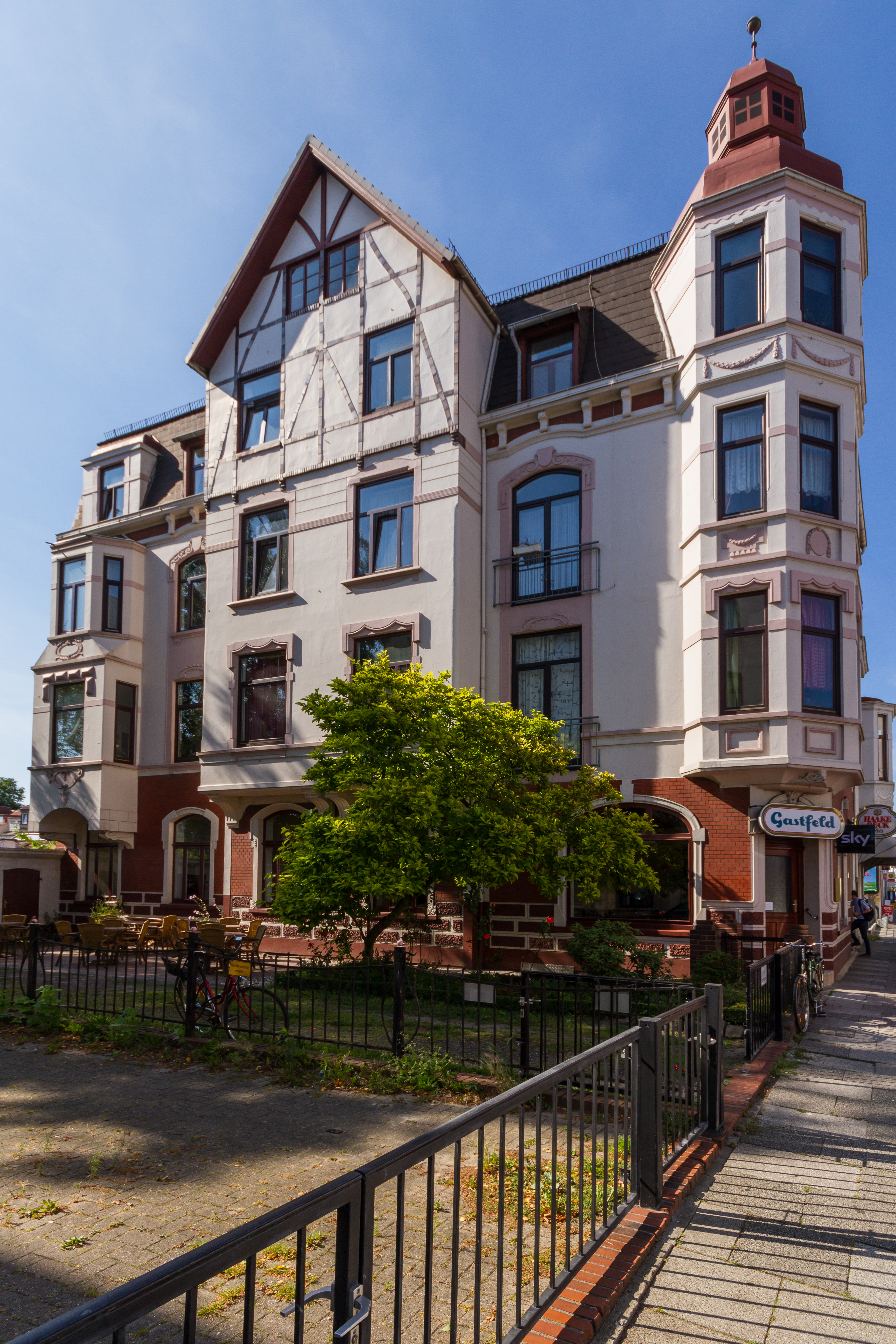 Wohnhaus in Bremen, Gastfeldstraße 67Das abgebildete Objekt ist ein geschütztes Kulturdenkmal in der Freien Hansestadt Bremen, mit der Nr. 1985 beim Landesamt für Denkmalpflege registriert.